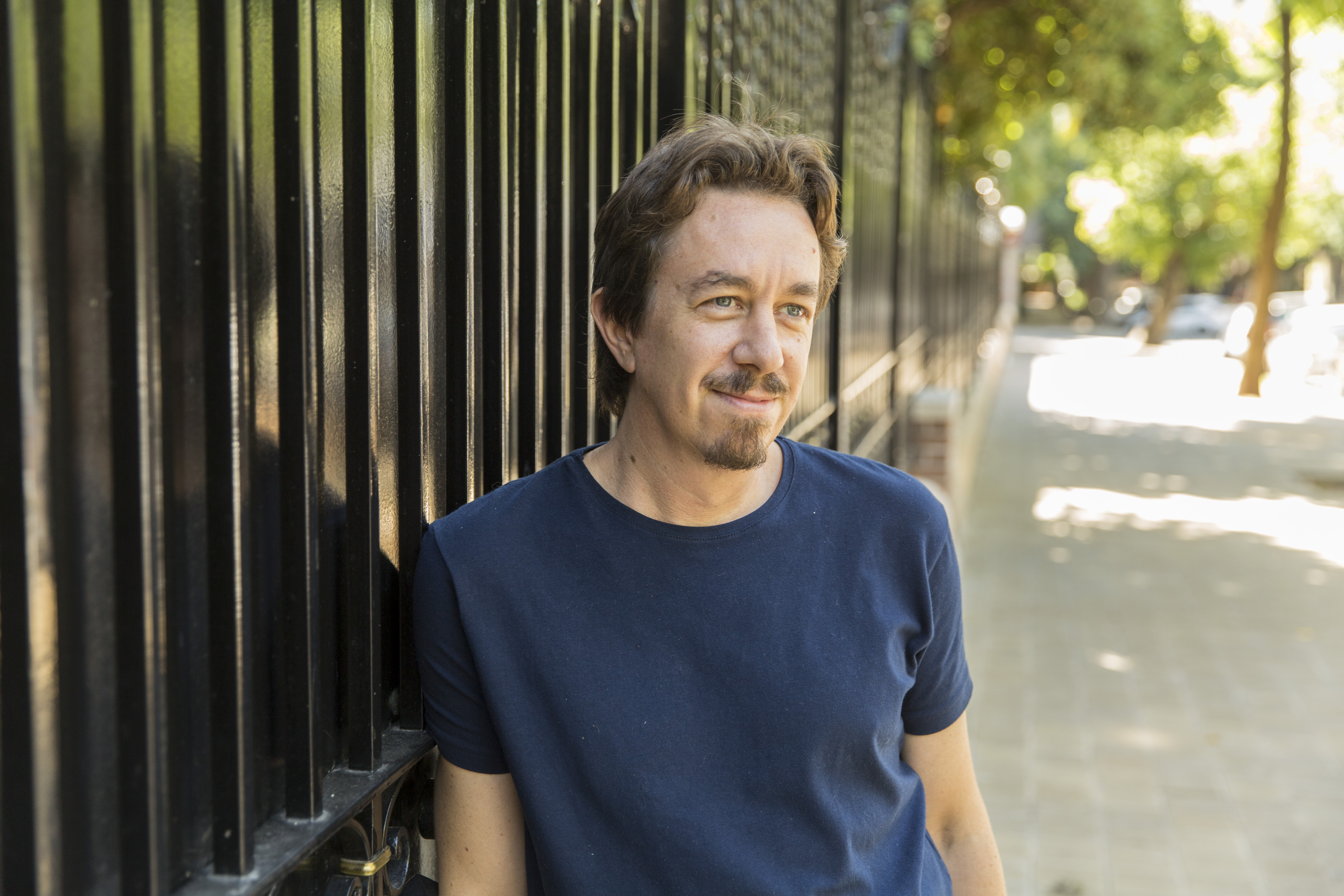 Buenos Aires, 8 de febrero de 2017. Entrevista al escritor Pedro Mairal.